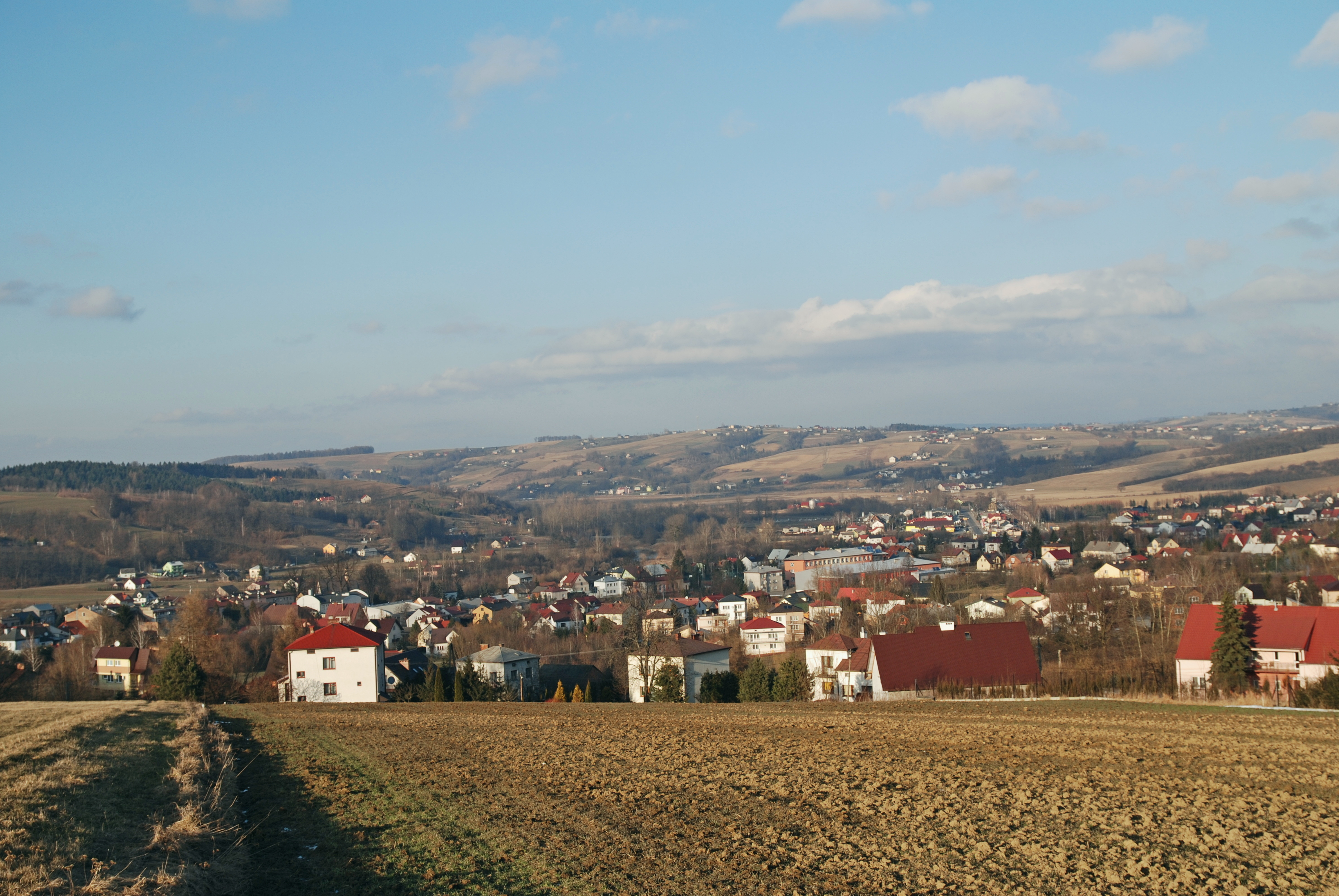 miasto Bobowa